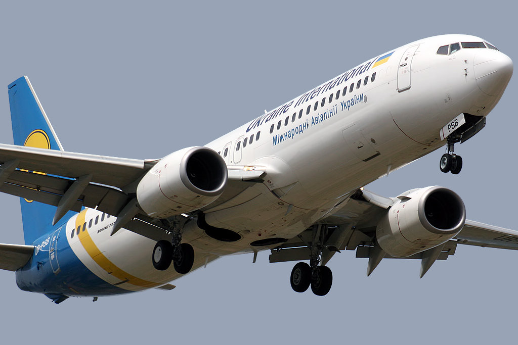 Barcelona El Prat (LEBL/BCN) Airport